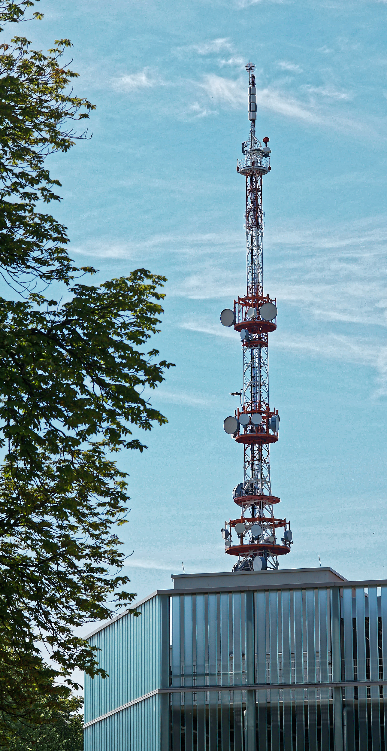 Sendeturm, aufgenommen vom unmittelbar angrenzenden Landschaftsschutzgebiet